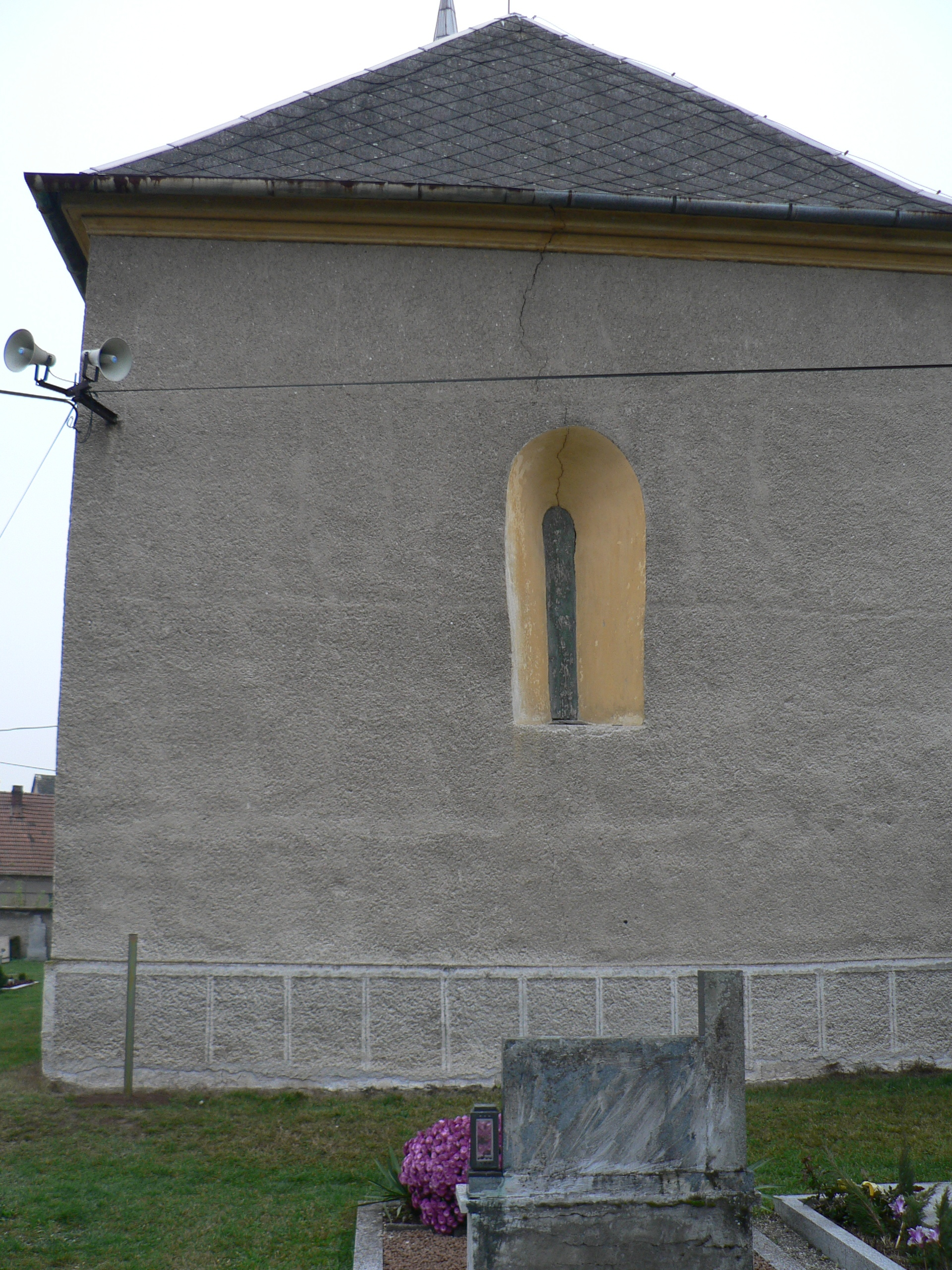 Kostel svatého Mikuláše (Police), presbytář